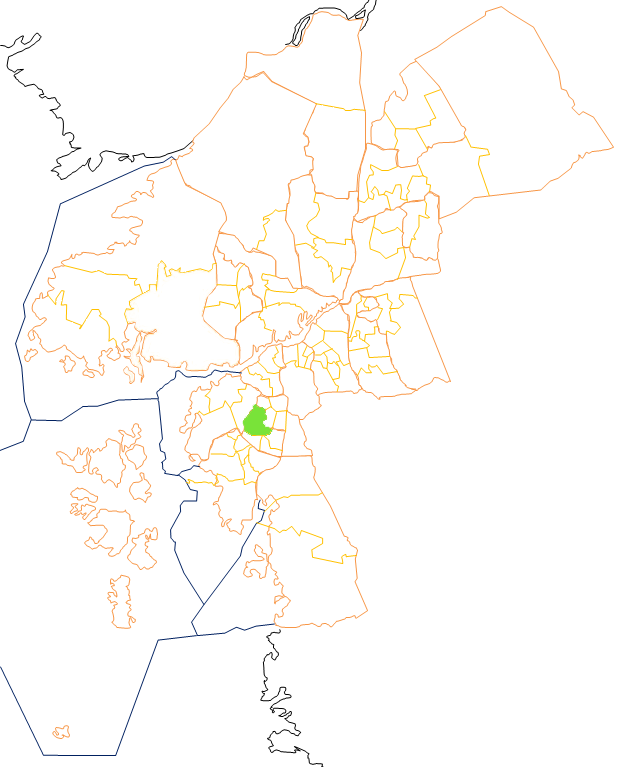 Karta som visar primärområdes belägenhet i Göteborg